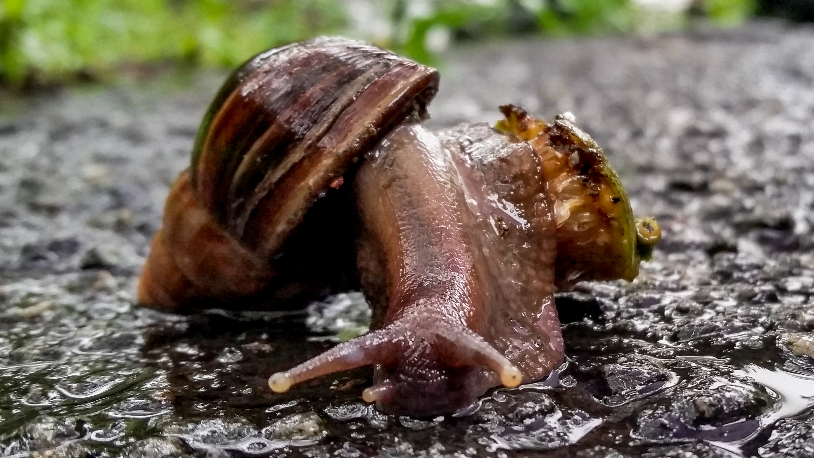 caramujo africano (Achatina fulica) Bairro Cota 400 Serra do Mar Cubatão/SP Brasil Marcos Simanovic